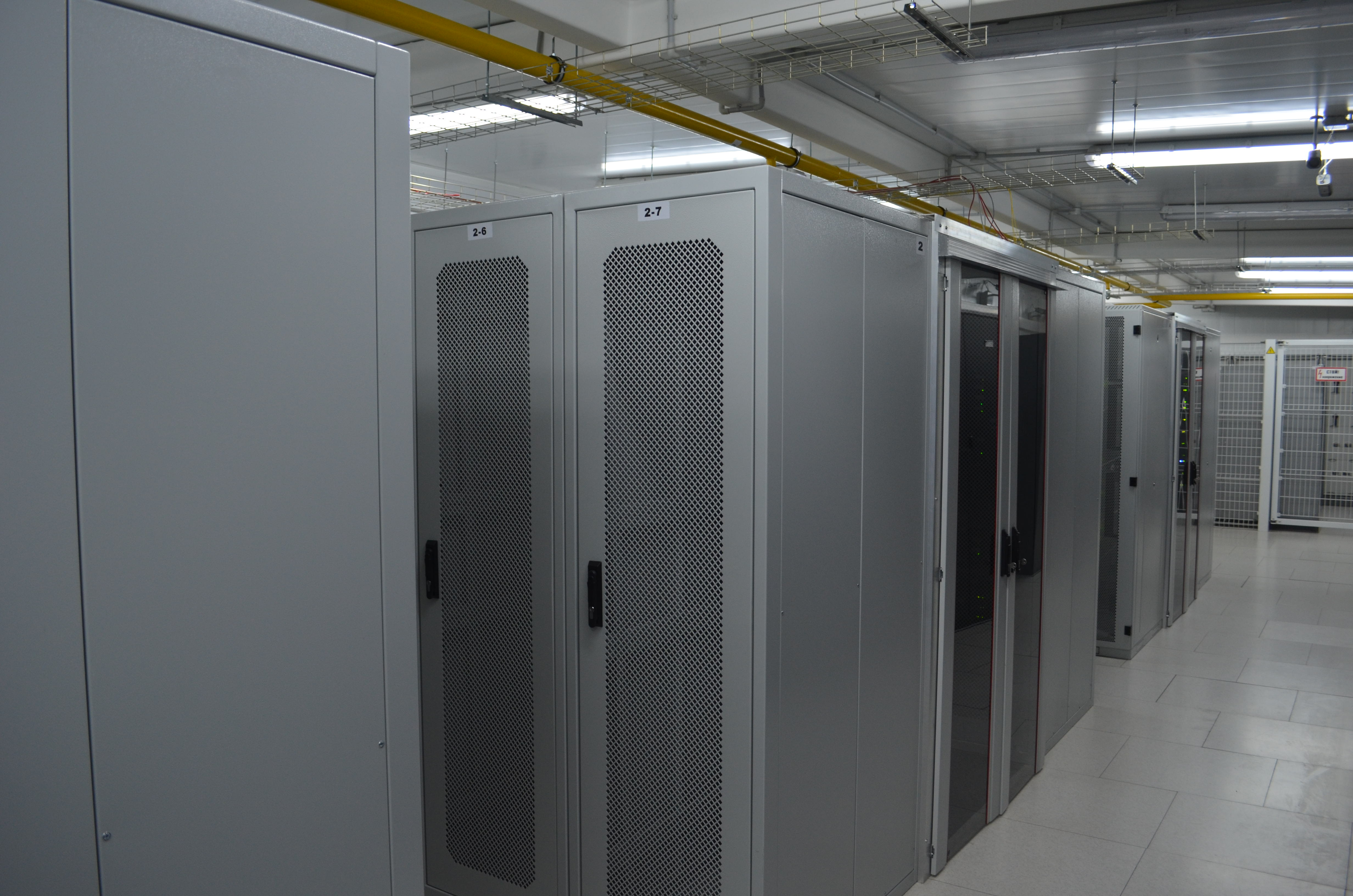 Дата-центр компании Reg.ru